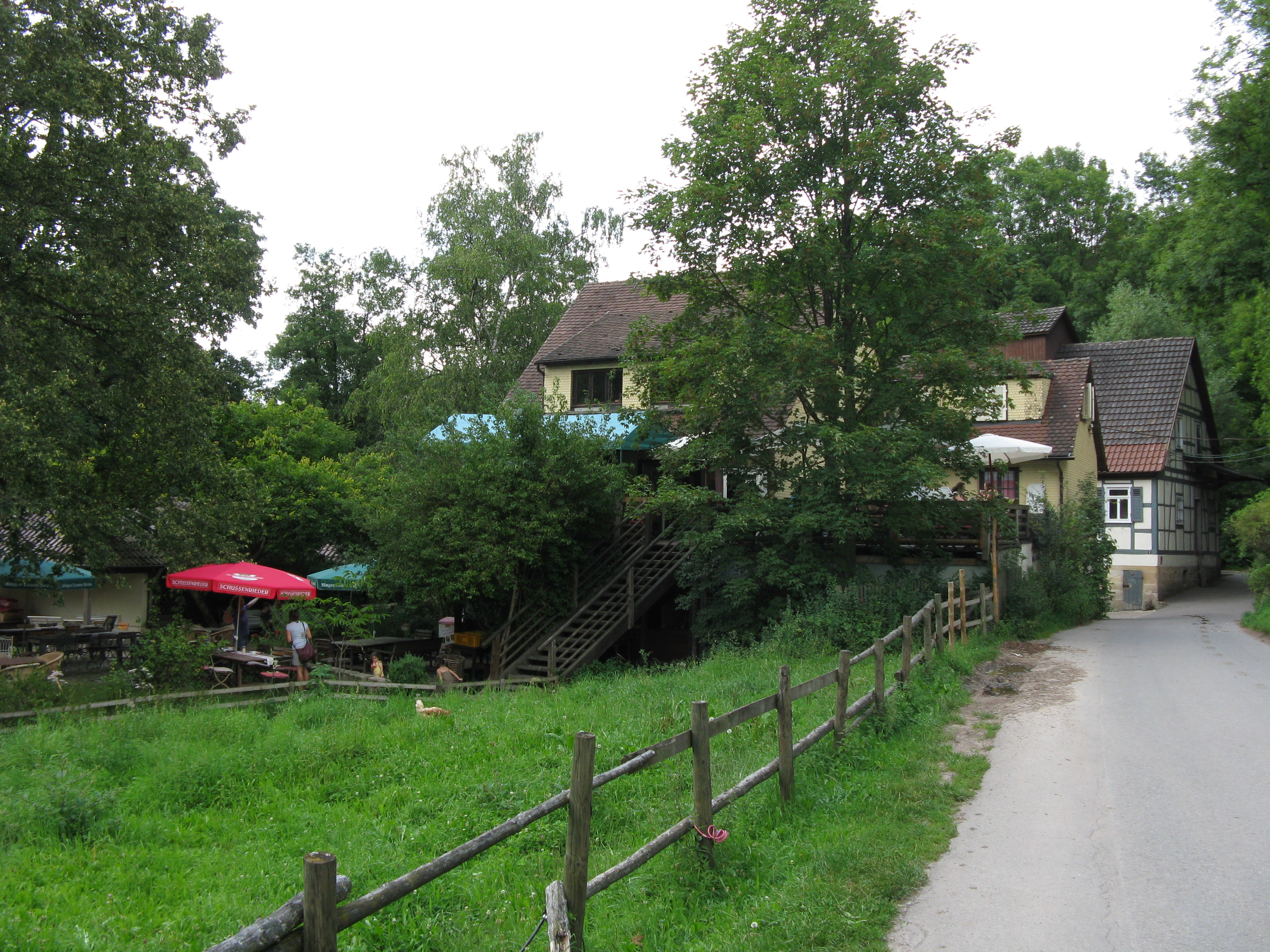 Die Eselsmühle (Gastwirtschaft, Landwirtschaft, Mahlbetrieb, Bäckerei) im Siebenmühlental